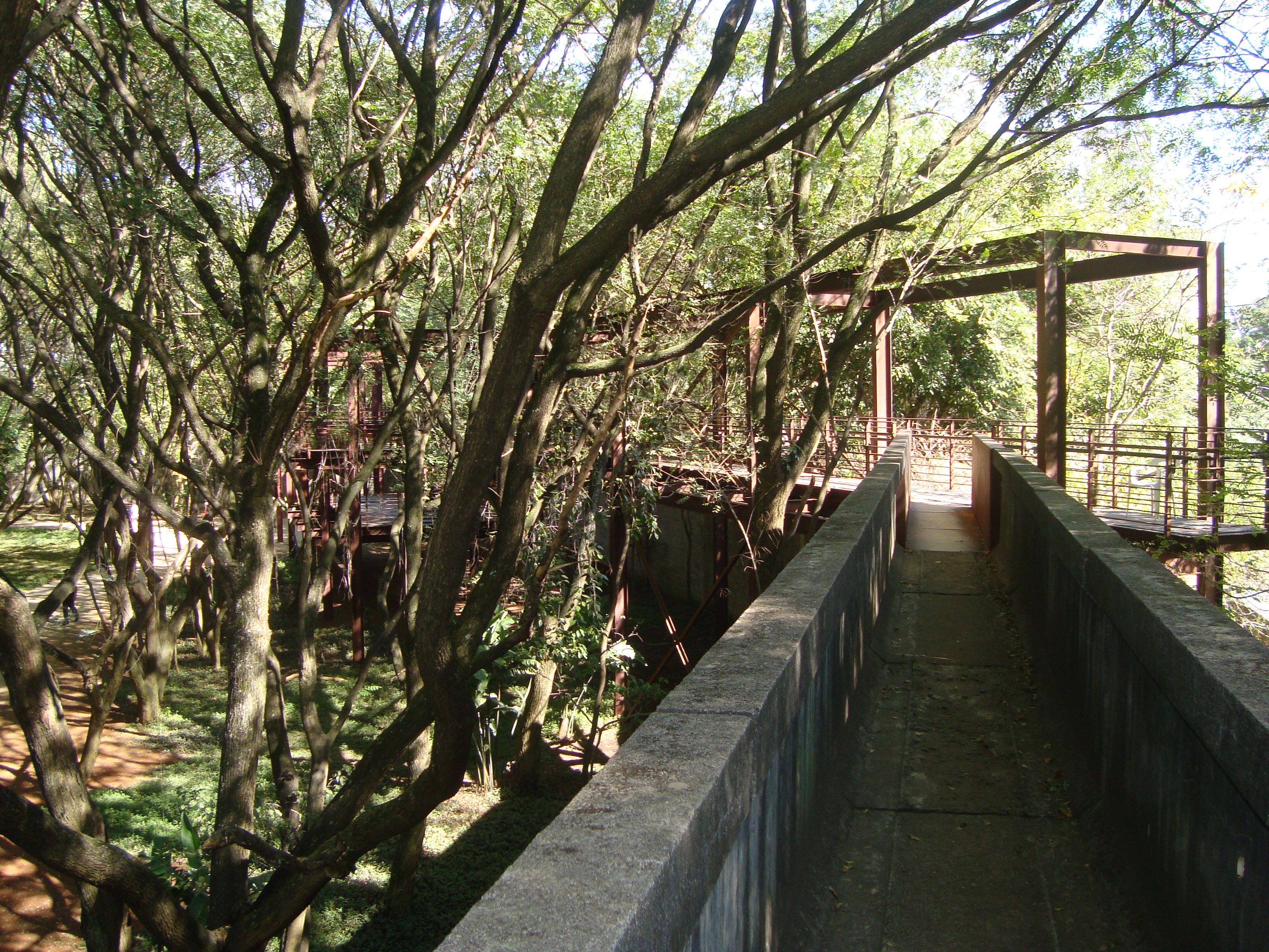 Resquícios da "muralha" da penitenciária foram transformados em passarelas cercadas de aborização. No Parque da Juventude em São Paulo, zona norte da cidade/ Brasil